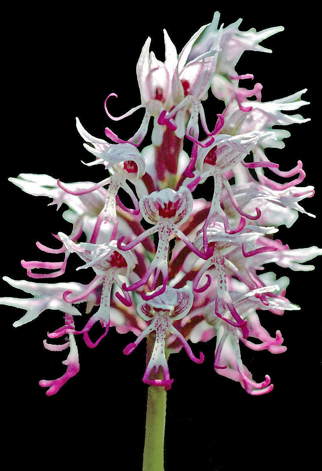 Landschaftsschutzgebiet Kaiserstuhl